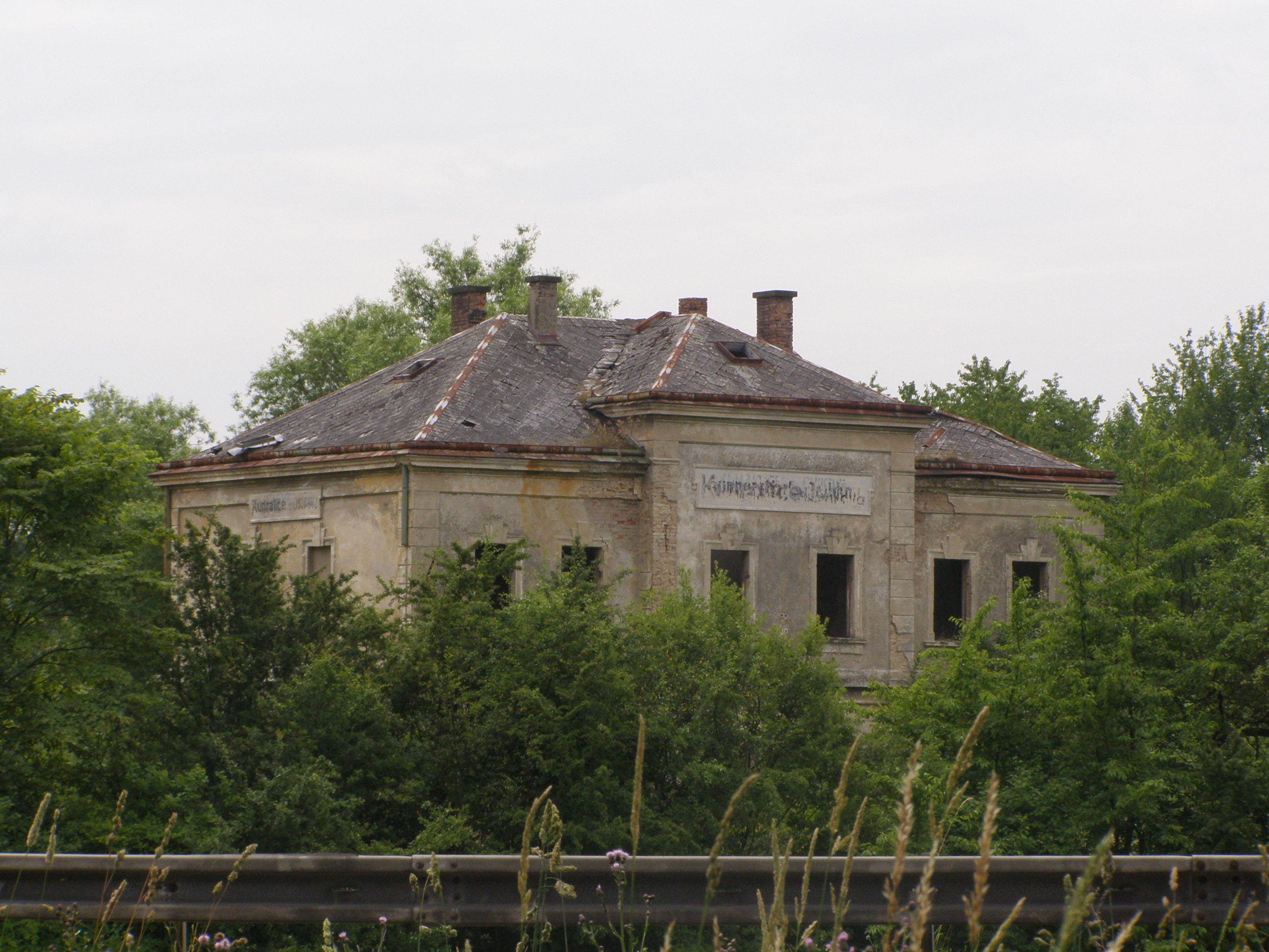 Česky: Kunratice u Cvikova, bývalé nádraží na trati Svor - Jablonné v Podještědí